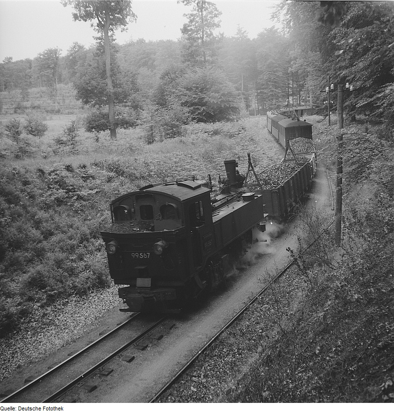 Original image description from the Deutsche Fotothek Die Rügensche Kleinbahn, auch Rasender Roland genannt